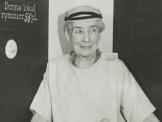 Marsyasteaterns chef Ise Morssing